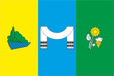 Прапор села Баннівка